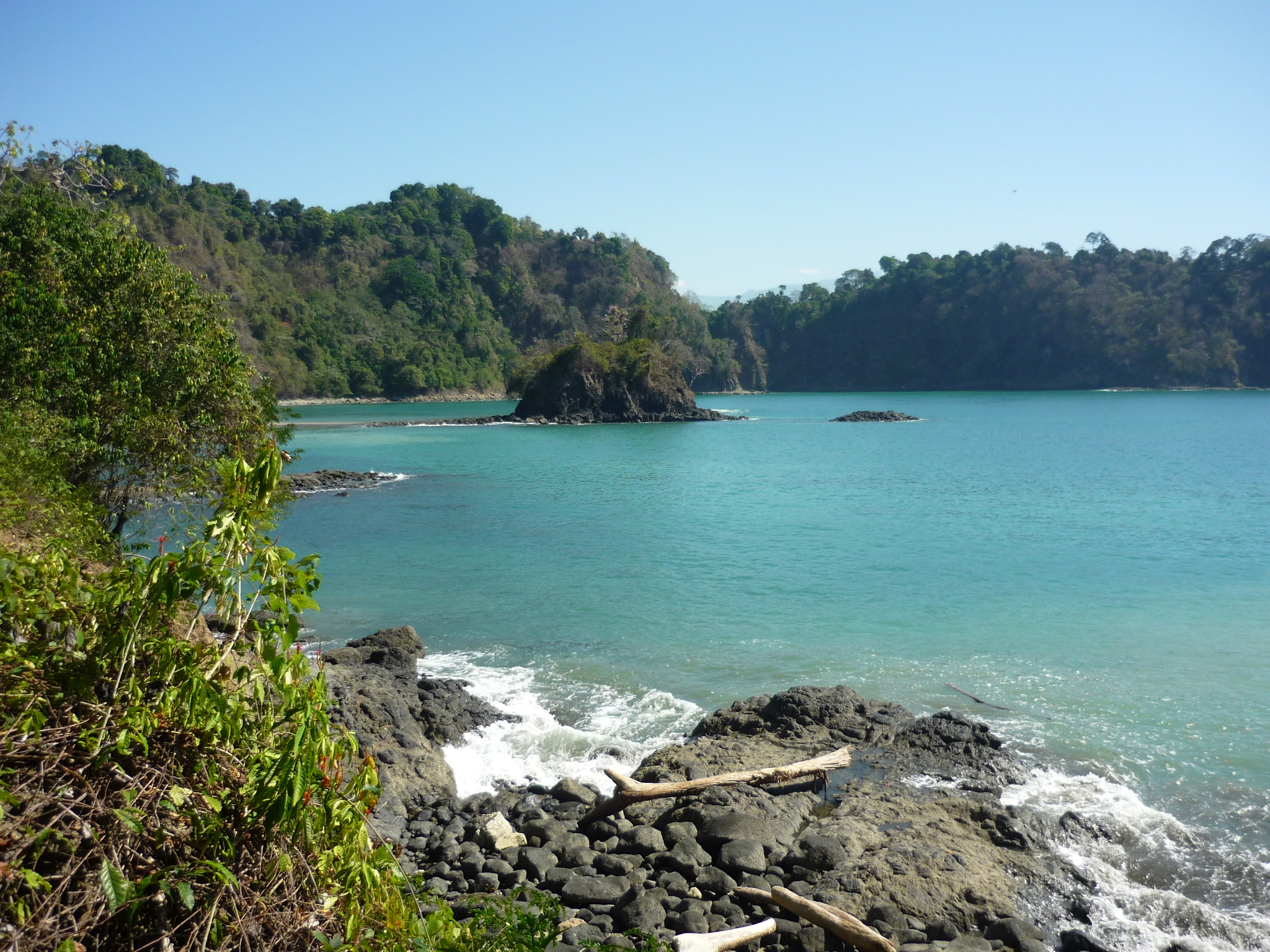 Una vista panorámica del área de Puerto Escondido en el Parque Nacional Manuel Antonio, Costa Rica